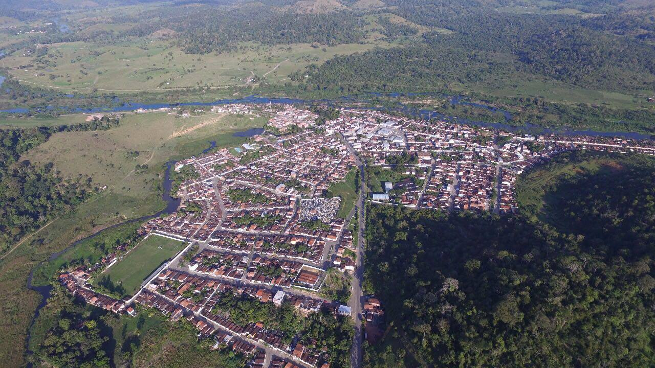 Imagem aérea da cidade de Jitaúna